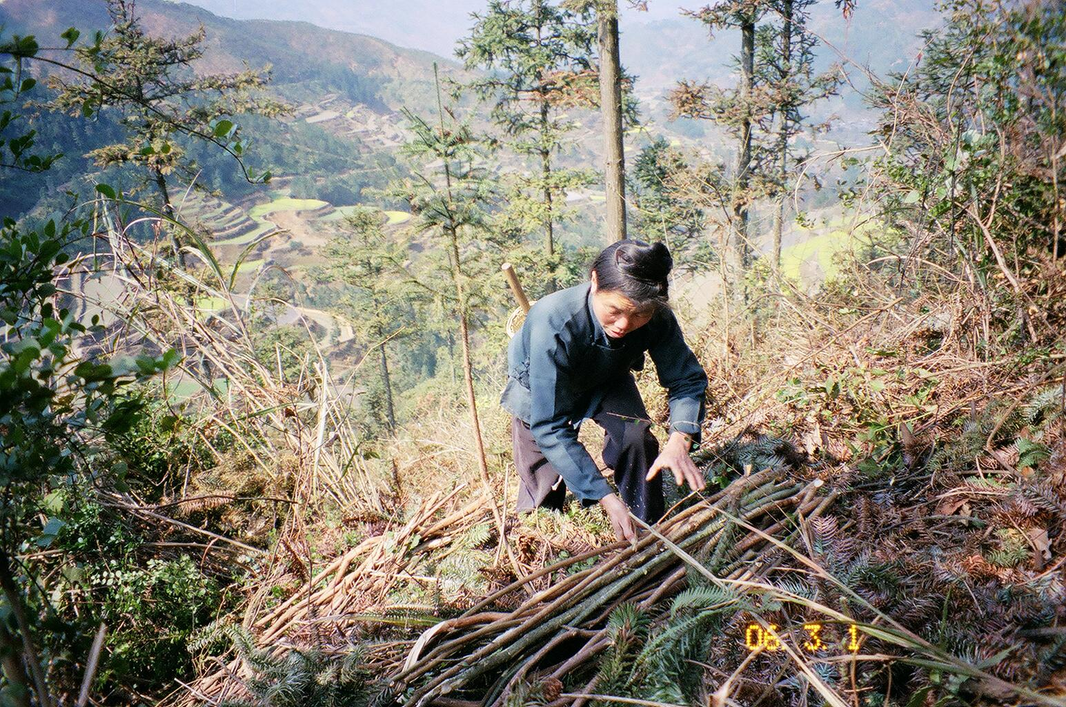 Local commons in Guizhou, China, offers free firewoods to villagers. This picture was taken by TORIKAI Yukihiro, a Japanese economist, in 2006/03/01. 里山での薪採取。斧をもって山に入って機を伐採するのではない。手にしたナテで刈ることができるような小枝を集めて巻きにする。これが、「柴刈り」（芝ではない）であって、森林伐採には当たらない。しかし、木材伐採量だけに注目した議論では、開発途上国の薪採取が森林現象を引き起こしていると、誤って、批判されている。2006年3月中国貴州省で鳥飼行博撮影。